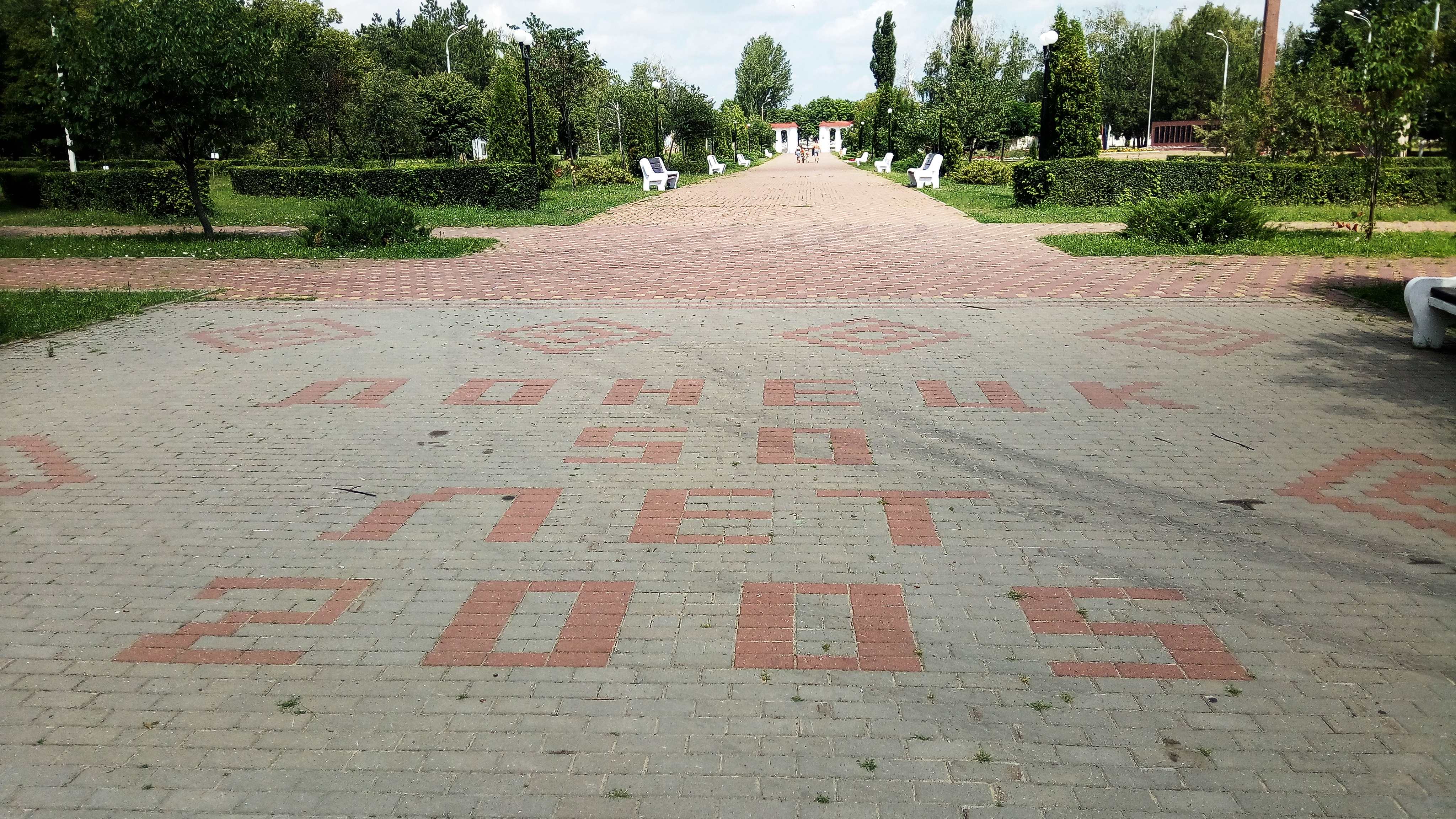 Парк Победы (Донецк РФ)